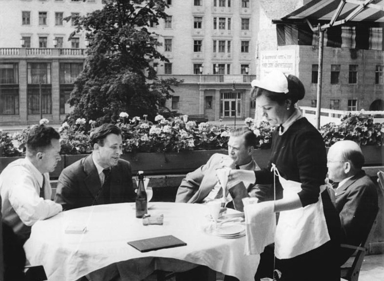 Zentralbild Heilig 6.8.1954. Aussprache zwischen Dr. John und Prof. Dr. Correns. Der ehemalige Präsident des Bonner Verfassungsschutzamtes, Dr. Otto John, suchte am 5.8.1954 den Präsidenten des Nationalrates, Prof. Dr. Correns, auf. Dr. Correns informierte Dr. John auf Wusch ausführlich über die Ziele und Aufgaben der Nationalen Front im Kampf um die friedliche Wiederherstellung der Einheit Deutschlands auf demokratischer Grundlage. In einem längeren offenherzigen Gespräch erklärte Dr. John, dass er seine Kräfte freudig für diese patriotische Aufgabe zur Verfügung stelle. Im Anschluss an die Unterredung besichtigten Dr. John und Prof. Dr. Correns das Hochhaus F-Süd in der Stalinallee. Der Chefarchitekt von Groß-Berlin, Nationalpreisträger Prof. Henselmann, erläuterte die Anlage der Stalinallee und die Wiederaufbaupläne des demokratischen Magistrats für die deutsche Hauptstadt. Dr. John besucht in der Stalinallee unter anderem eine Neubauwohnung, das im Bau befindliche Kinderkaufhaus und die Deutsche Sporthalle. UBz: Auf der Terrasse des Cafes "Warschau" (v.r.n.l.) Prof. Dr. Correns, Dr. John, Professor Henselmann und Dr. Girnus vom Ausschuss für deutsche Einheit.